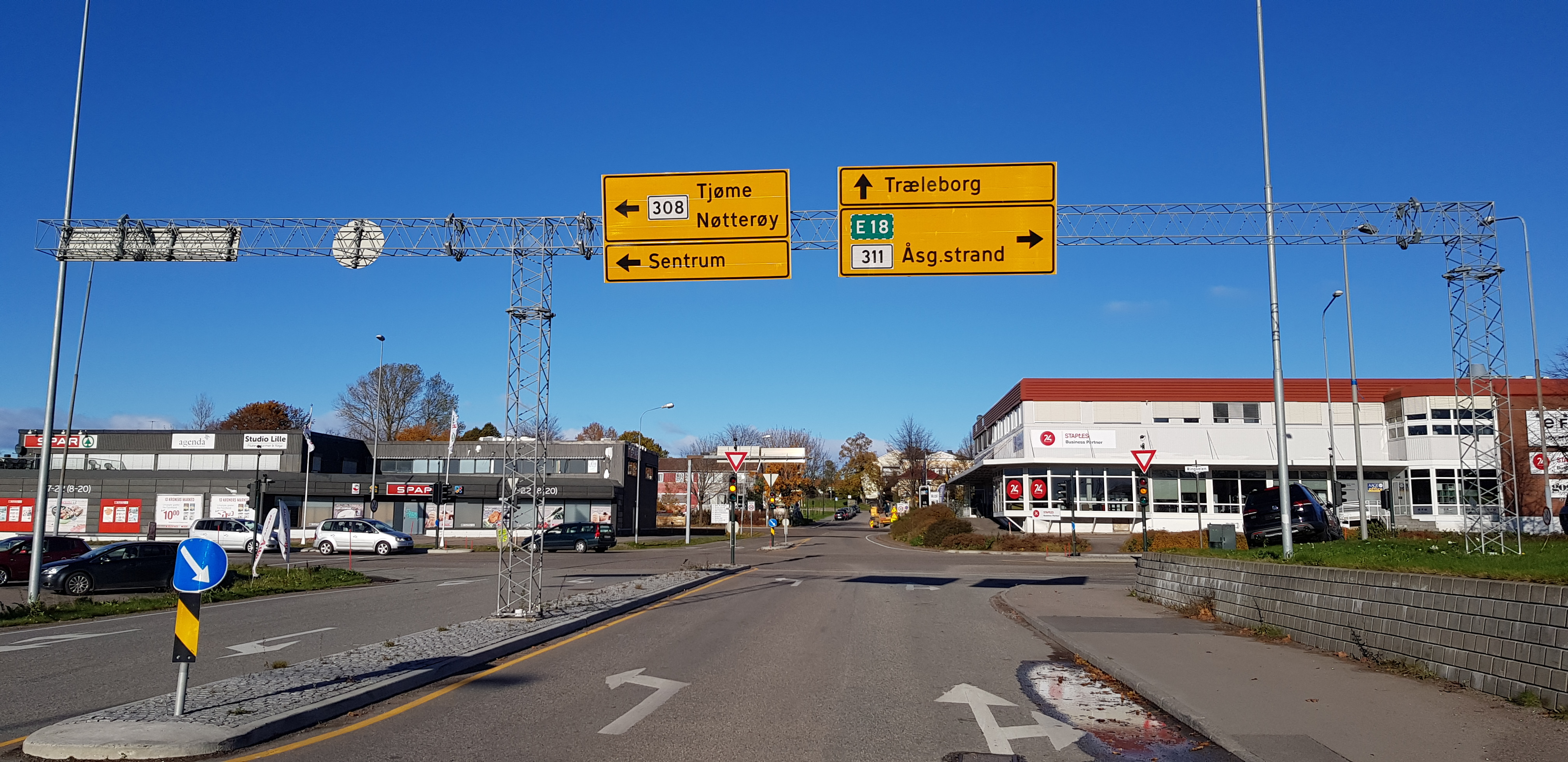 Måkeveien på Stensarmen/Træleborg i Tønsberg